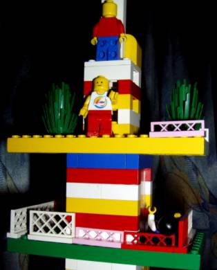 Ukázka použití stavebnice Lego.